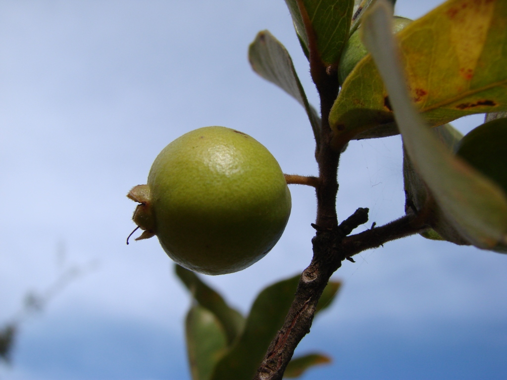 Psidium salutare var pohlianum - MYRTACEAE - Parque Olhos D'Água - Brasília - Distrito Federal - Brasil.